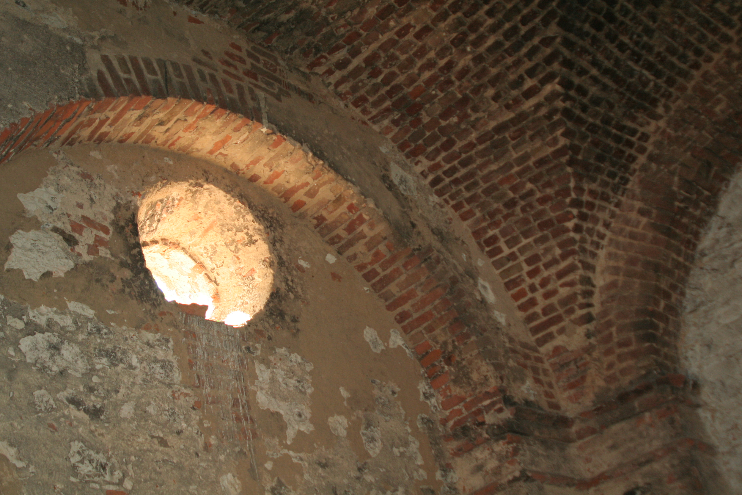 Tzw. Wieża Ariańska pod Krupem, niedaleko Chełma, wnętrze.